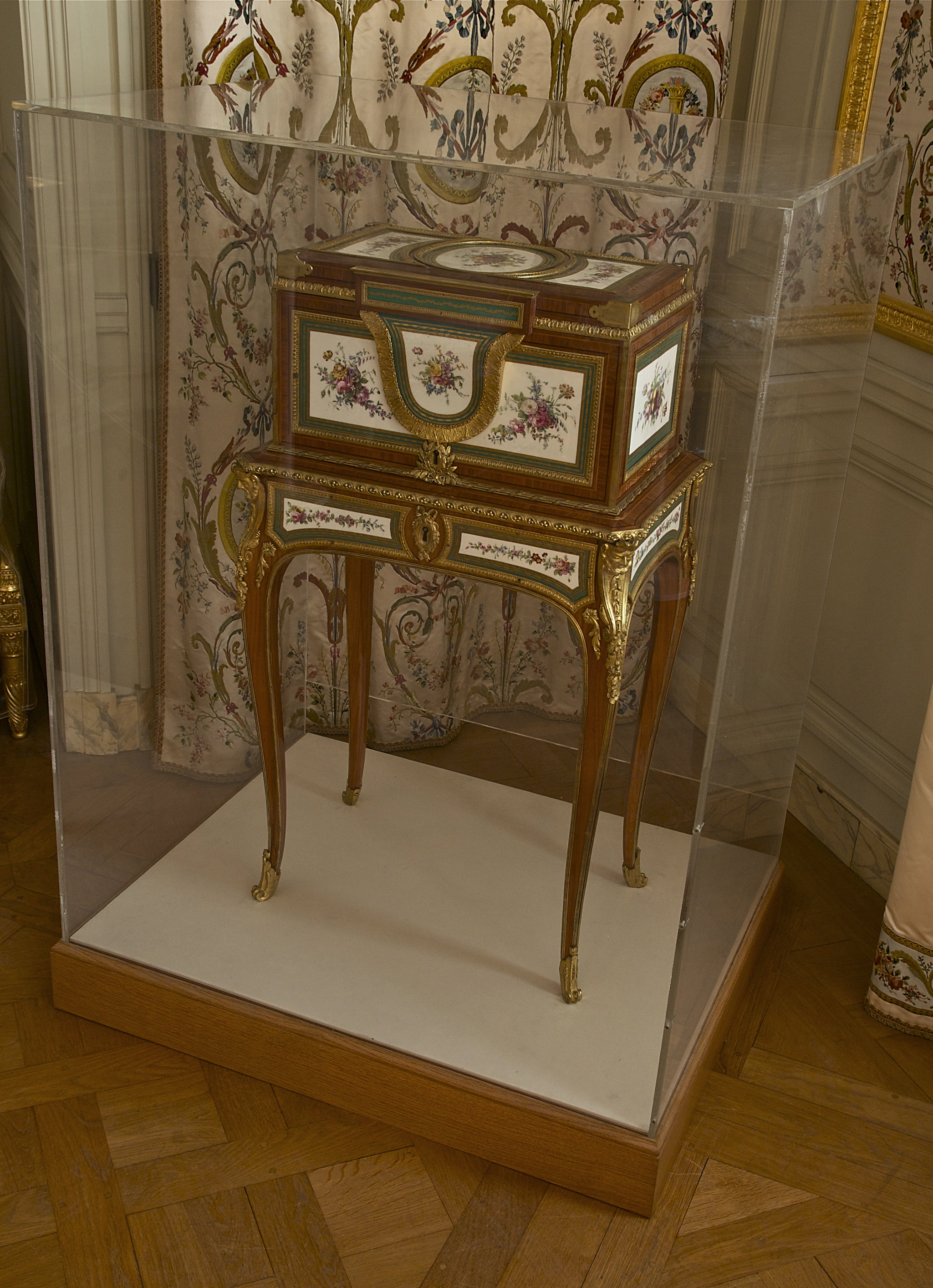 Coffre à bijoux de Marie-Antoinette dauphine